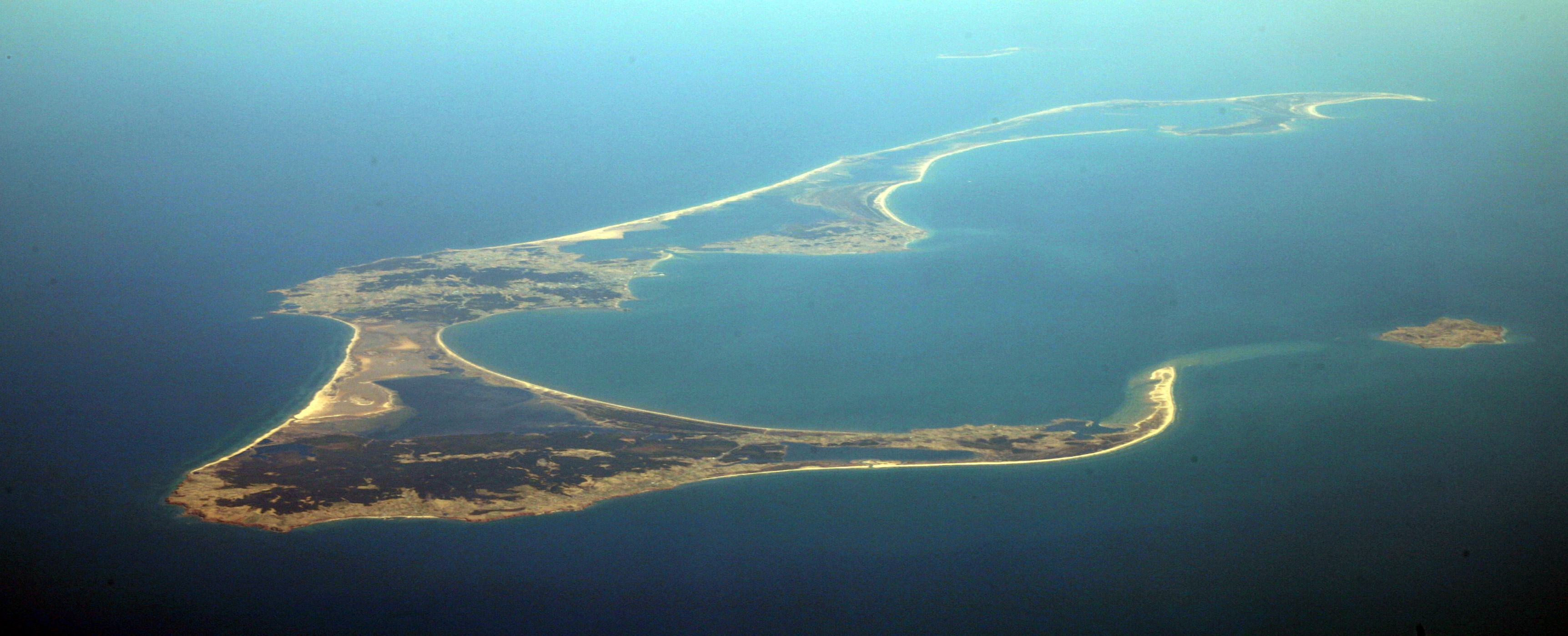 Les Îles-de-la-Madeleine , aka the Magdalen Islands , with the towns of Fatima, Grosse-Île, Îles du Havre aux Maisons, in the Gaspésie–Îles-de-la-Madeleine region of Quebec. The islands are an archipelago comprised of Havre-Aubert, Grande Entrée, Cap aux Meules, Grosse-Île, Havre aux Maisons, Pointe-Aux-Loups, Île d'Entrée and Brion.